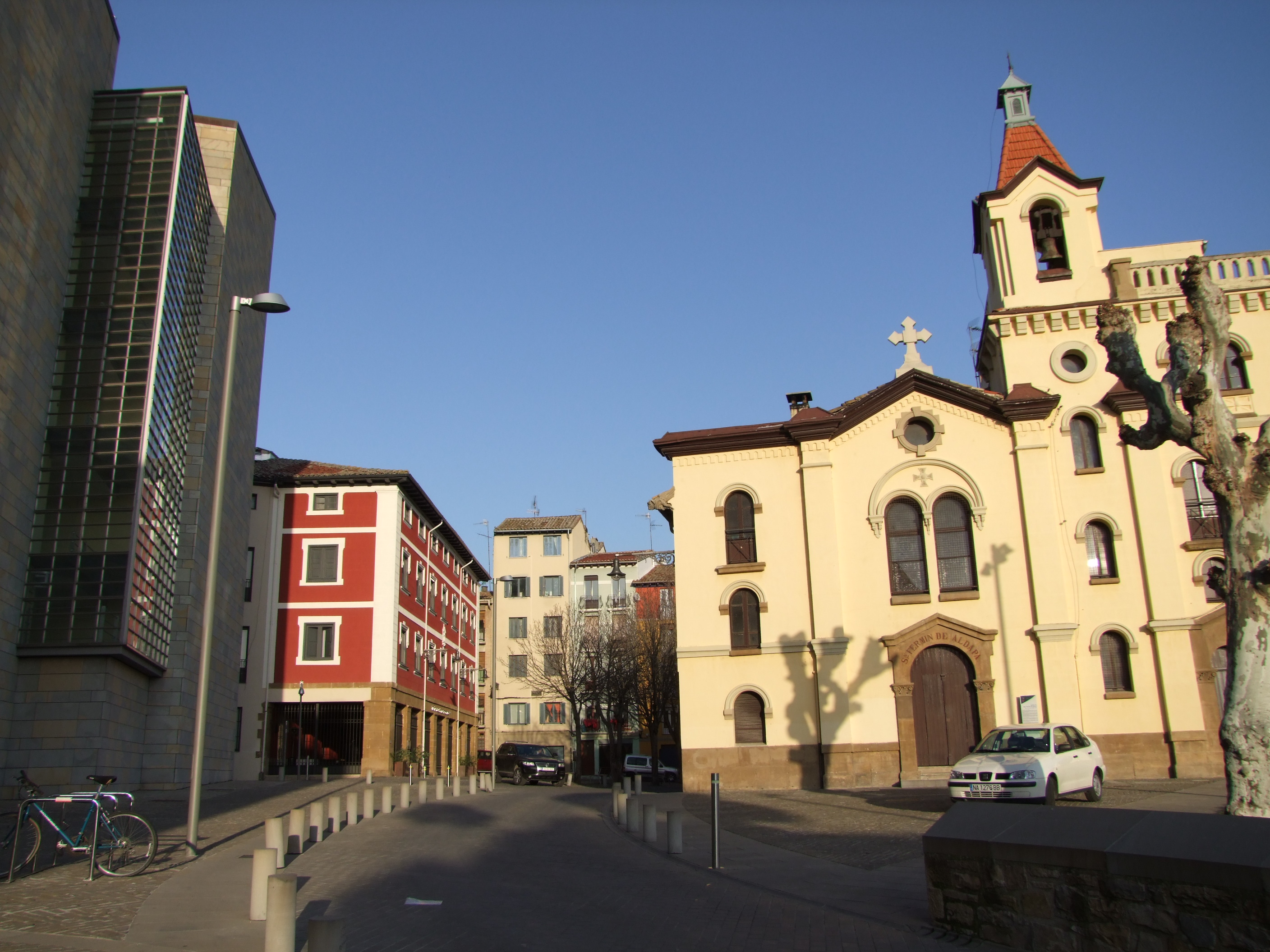 INAP, hots, Nafarroako Administrazio Publikorako Institutuaren XXV. urtemuga izan da martxoaren 9an Iruñeko alde zaharrean. Bertan mintzaldia eman dut etorkizuneko formakuntzaz. Crowdsourcinga formakuntzan sartzeko aukera ere aipatu dut. Eskerrik asko Tomás Rodríguez Garraza jaunak zuzentzen duen INAP erakundeari, Álvaro, Iñaki eta Marimar lagunei ere. Eta eskerrak ere, Javier Caballero presidenteordeari ere. Izan daitezen fotoak gertakari honen gomutagarri betirako. En el 25 aniversario del INAP (Instituto Navarro de la Adminsitración Pública), he tomado parte en el evento con una conferencia sobre el futuro de la formación. He comentado la posibilidad de integrar el crowdsourcing en la formación. Doy las gracias a D. Tomás Rodríguez Garraza, director del INAP; a Álvaro Martínez, a Iñaki, a Marimar y a los demás amigos que he dejado en la vieja Iruña. También mi agradecimiento al vicepresidente D. Javier Caballero. Sirva estas fotos y el vídeo como recuerdo para siempre de este evento.